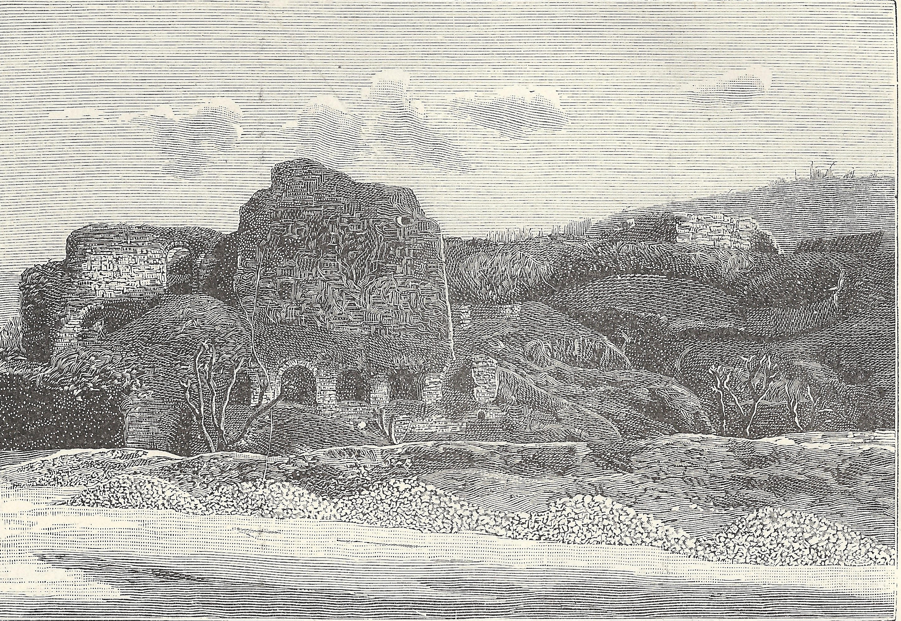 Avellino: avanzi del castello dei principi di Avellino (incisore anonimo 1898).